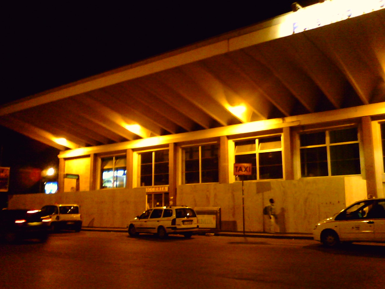 Stazione FFSS di Palermo Notarbartolo durante i lavori